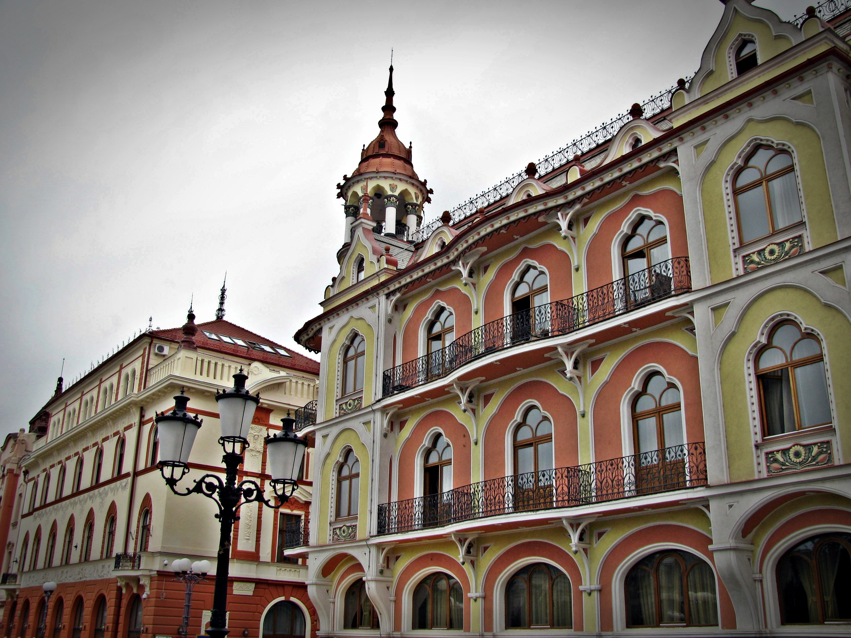 Hotel şi cafenea "Astoria” (fostul palat Sztarill şi cafenea Emke)